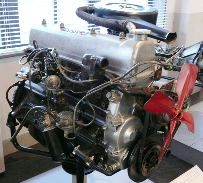 prince G7 engine.